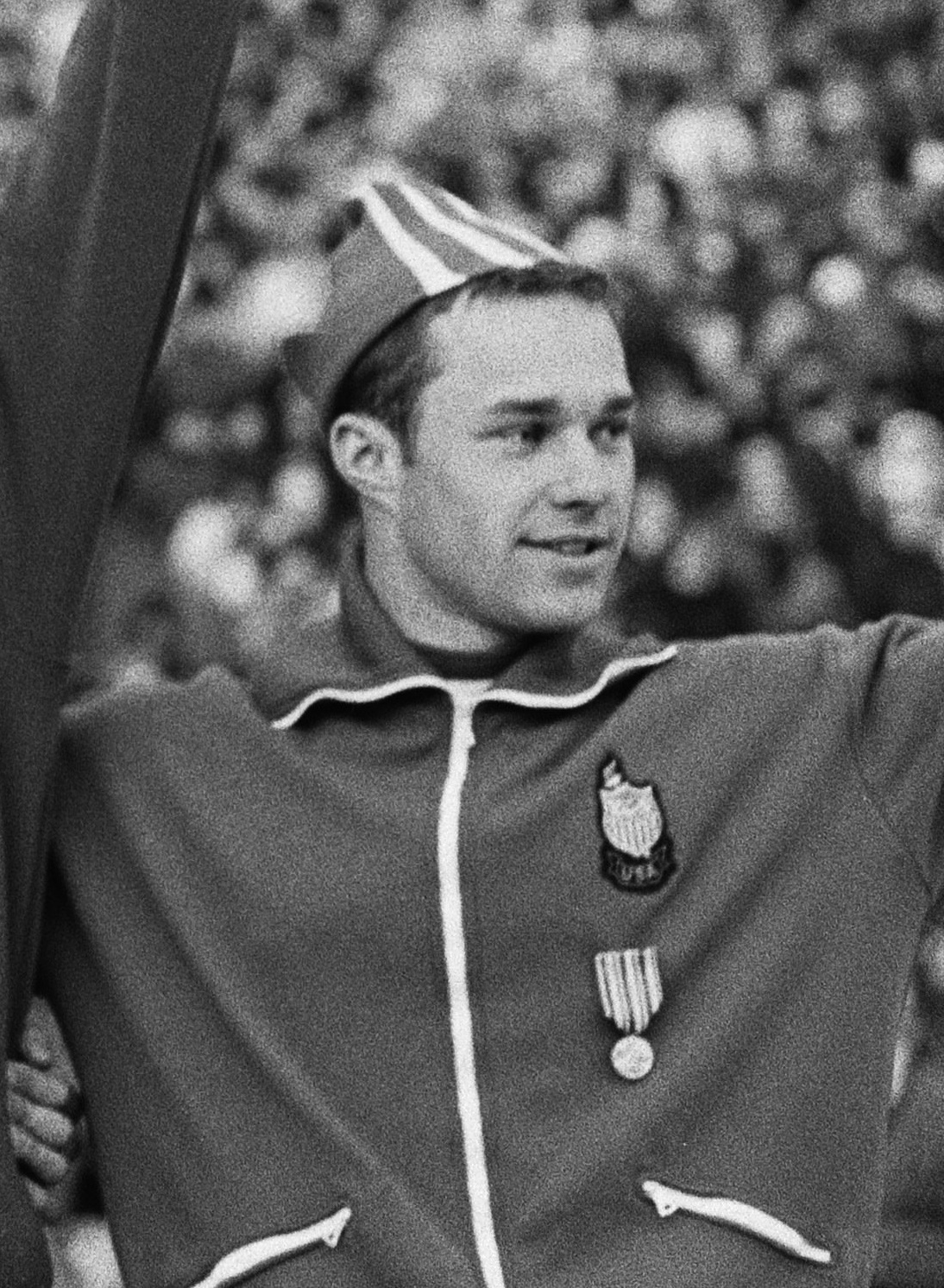 Neil Blatchford